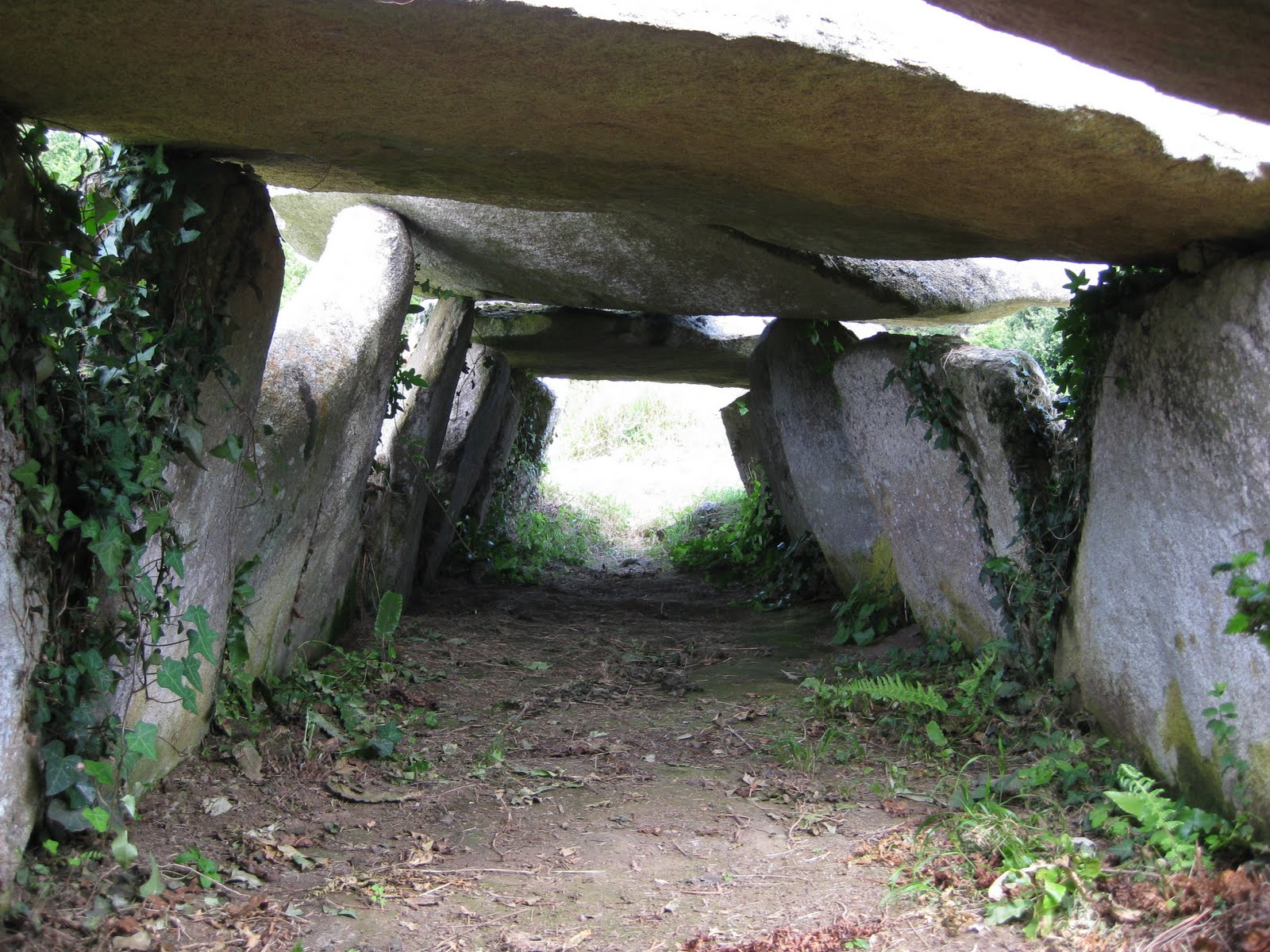 Allée couverte de Prajou